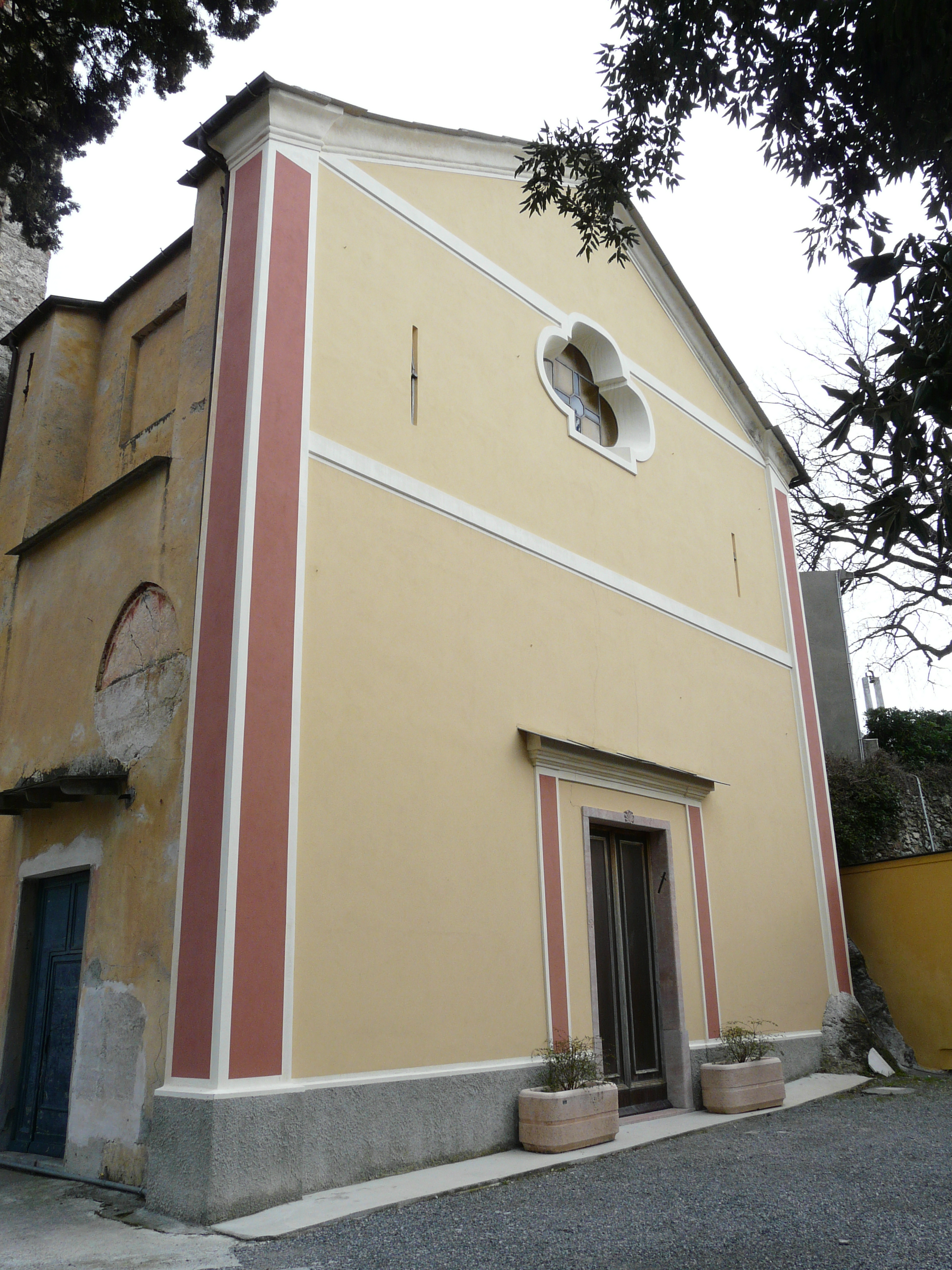 Chiesa di San Giovanni Battista, Bardino Vecchio, Tovo San Giacomo, Liguria, Italia